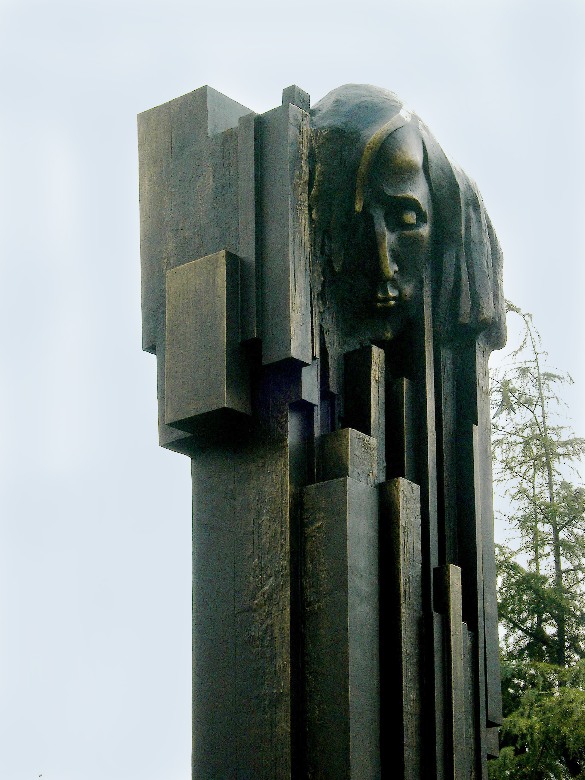 Pomnik Chopina w Parku im. Sun Jat-senta w Szanghaju Chopin Monument, Zhongshan Gongyuan, Shanghai Author of photo: Konrad Godlewski